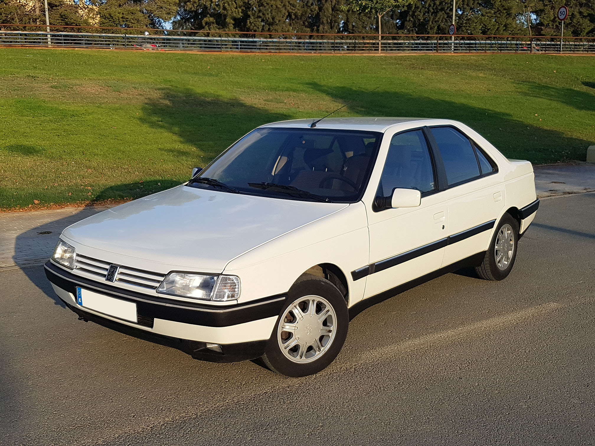 Peugeot 405 SRI 1992